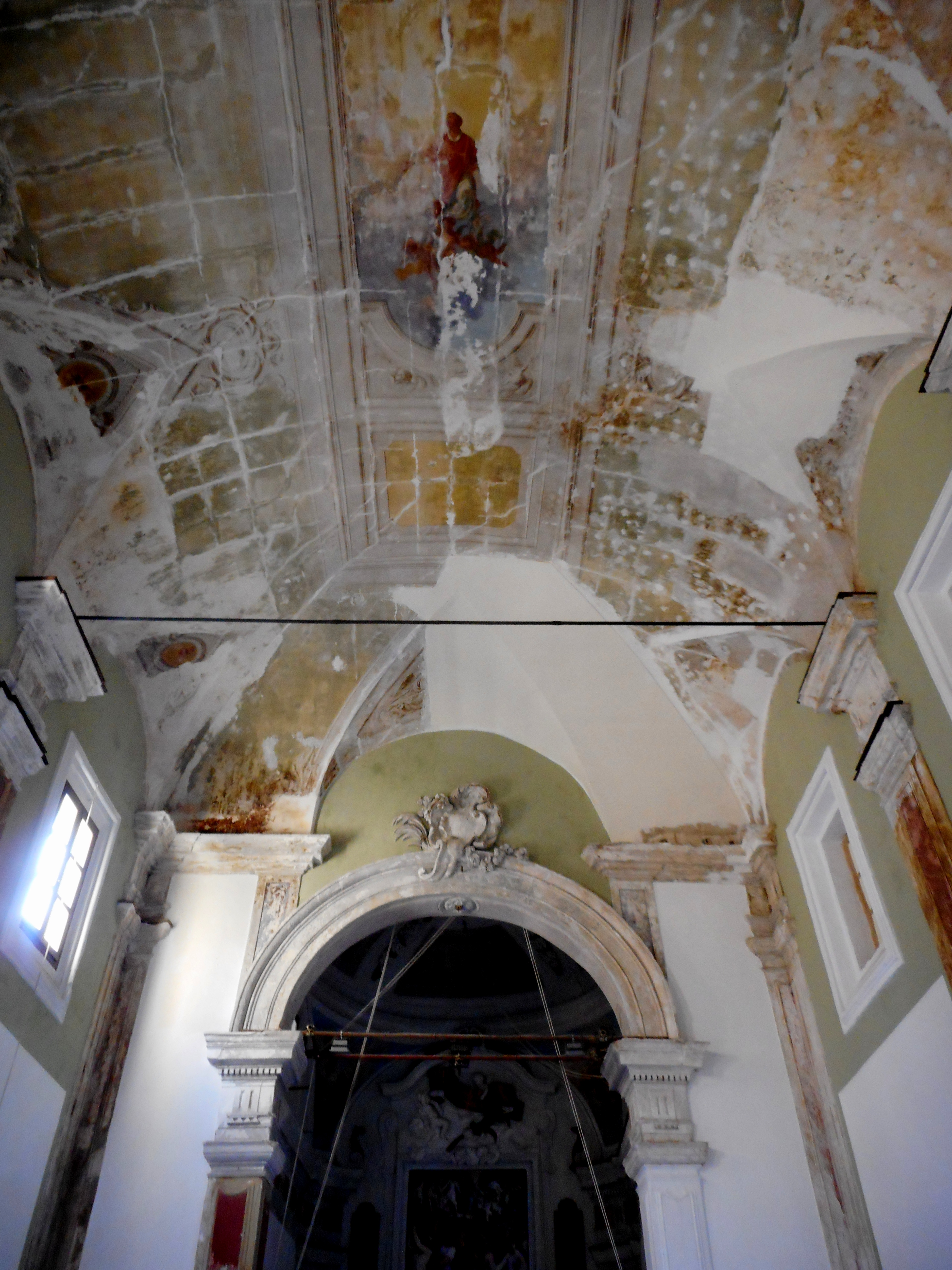 Interno e volta dell'oratorio di Santo Stefano Protomartire